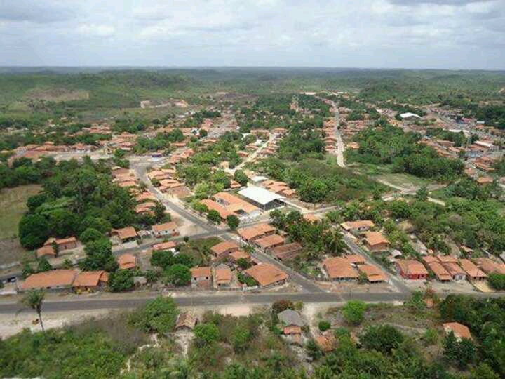 vista da cidade presidente vargas